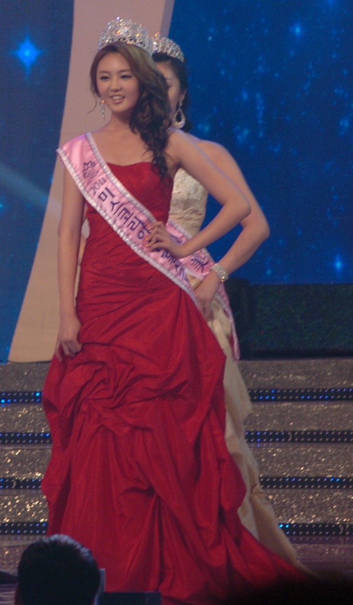 2011 미스코리아 선 김이슬